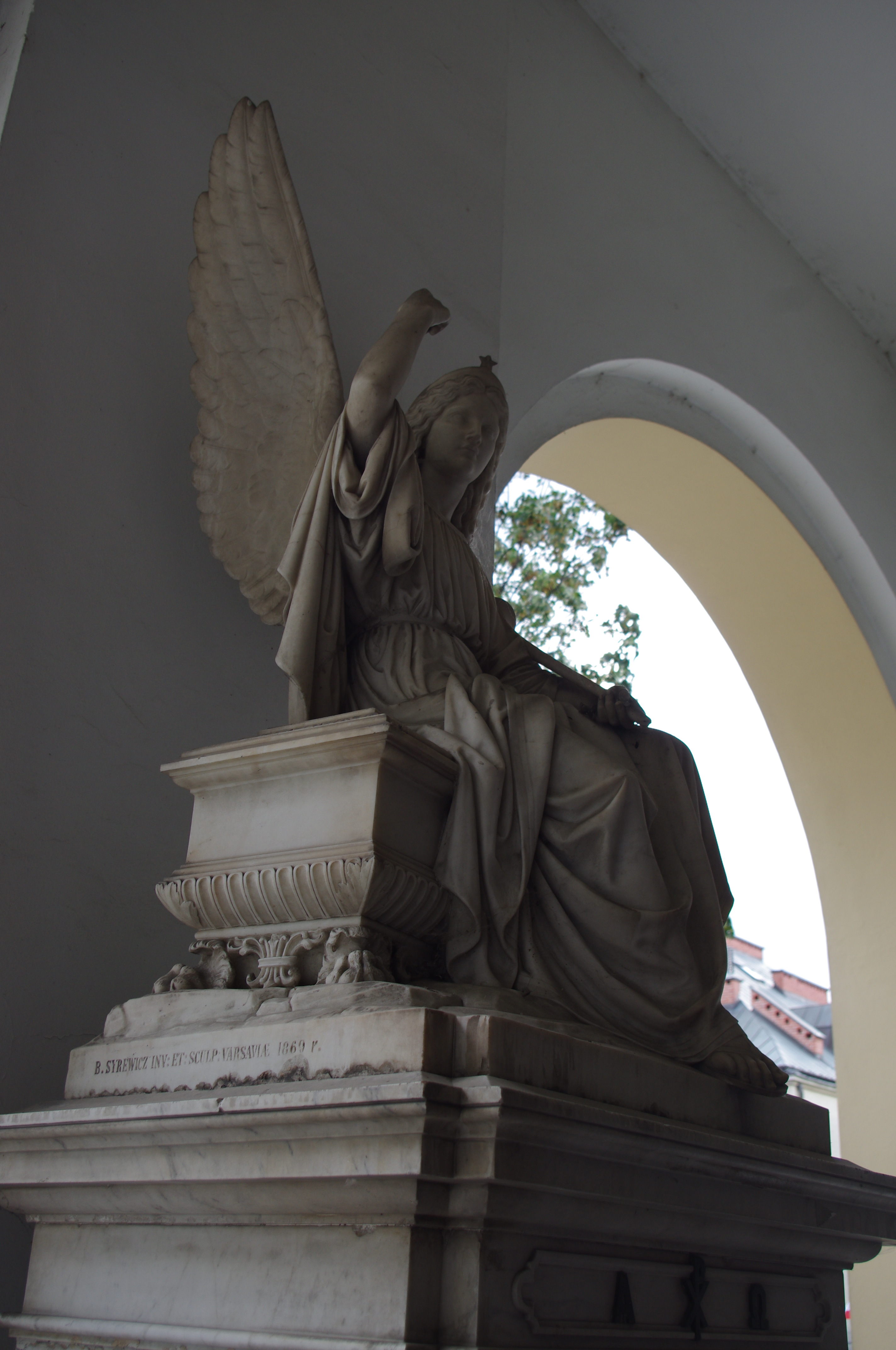 Rzeźba Bolesława Syrewicza przy wejściu do Kościoła św. Stanisława Kostki w Warszawie